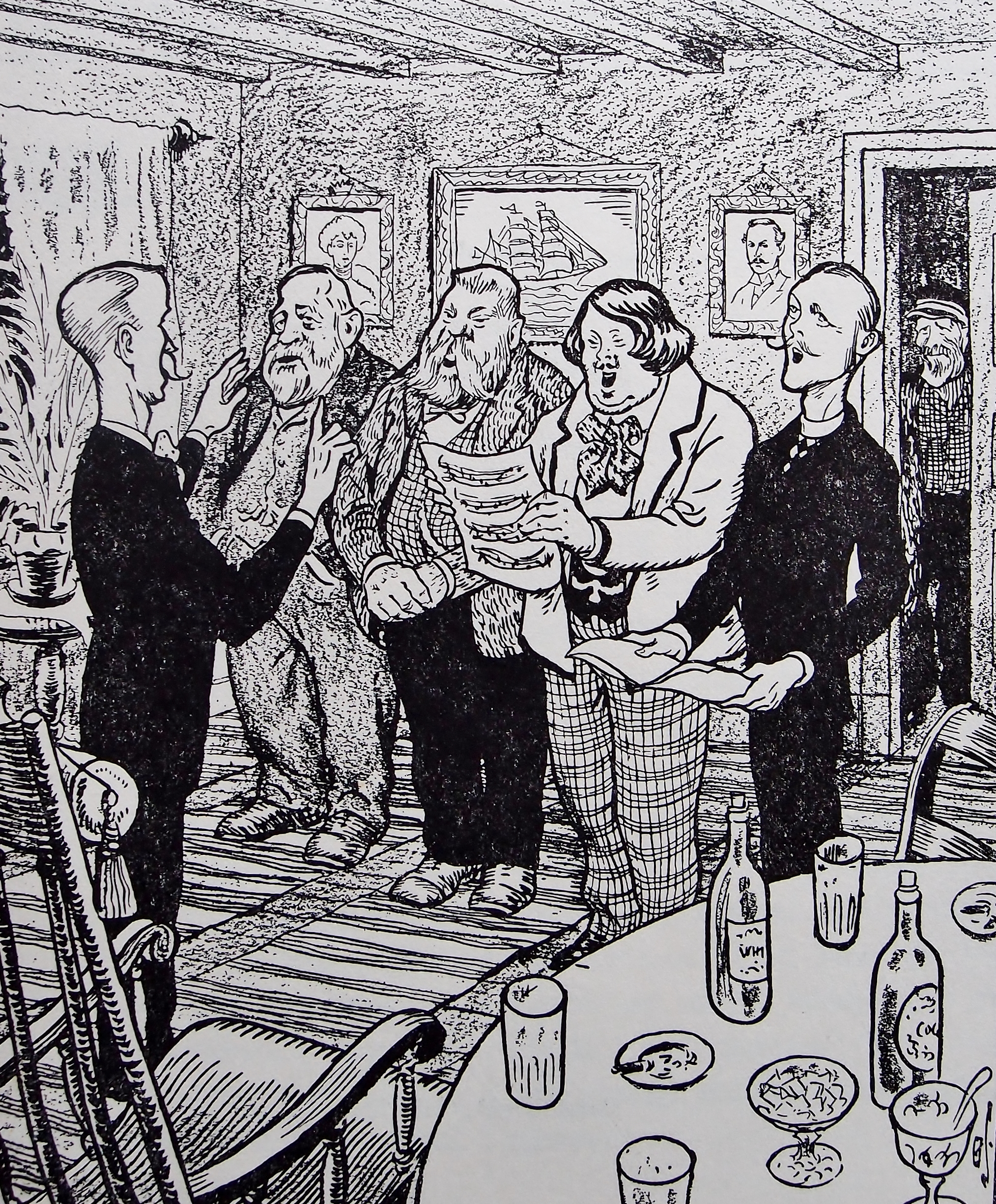 Eit knippe rollefigurar i Trangvikposten